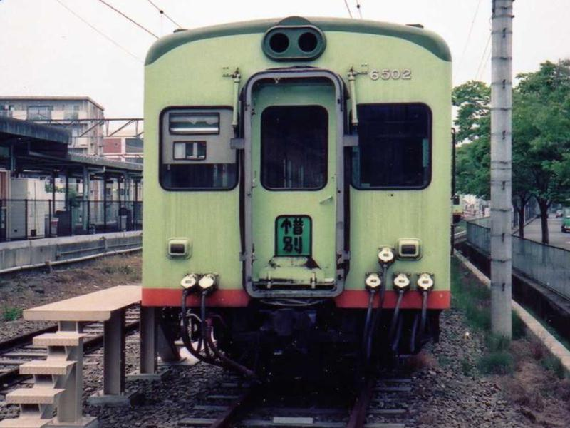 Sagami Railway(Sotetsu), EMU Type 6000 No.6502 At Atsugi Sta.